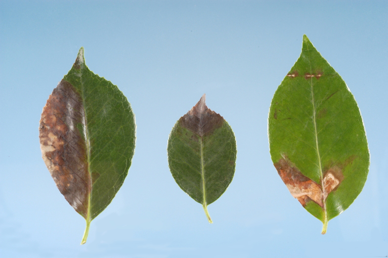 Phytophthora ramorum, symptômes sur feuilles de camélia Camellia japonica L.).